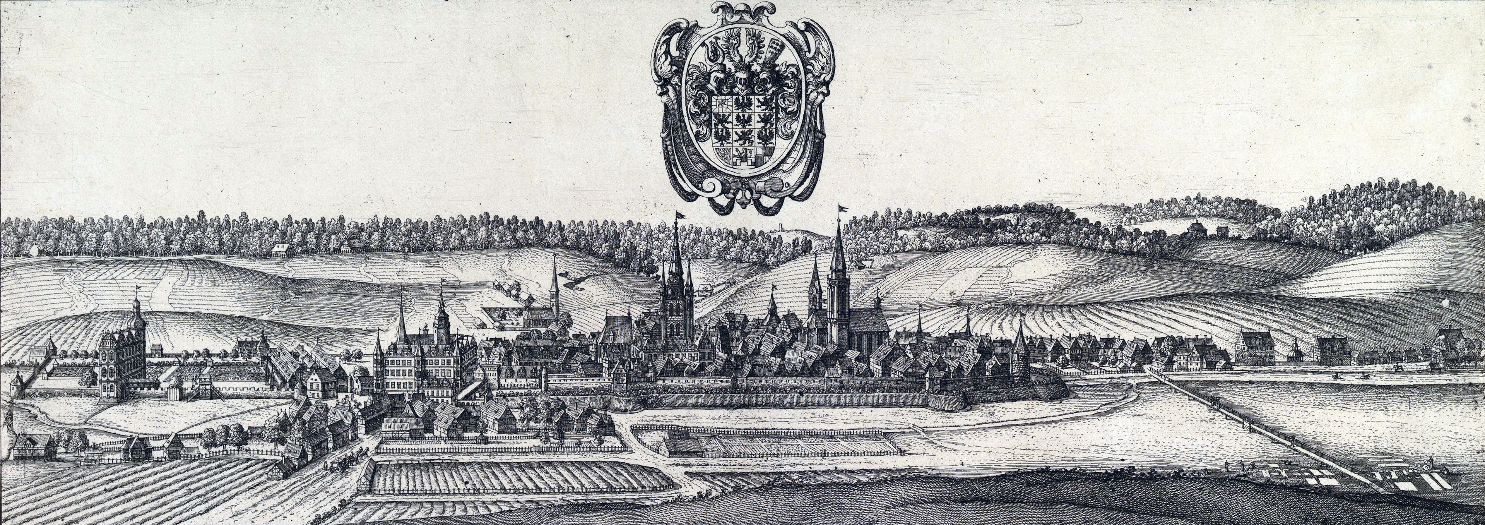 Stadtansicht von Ansbach (Kupferstich, 1642)